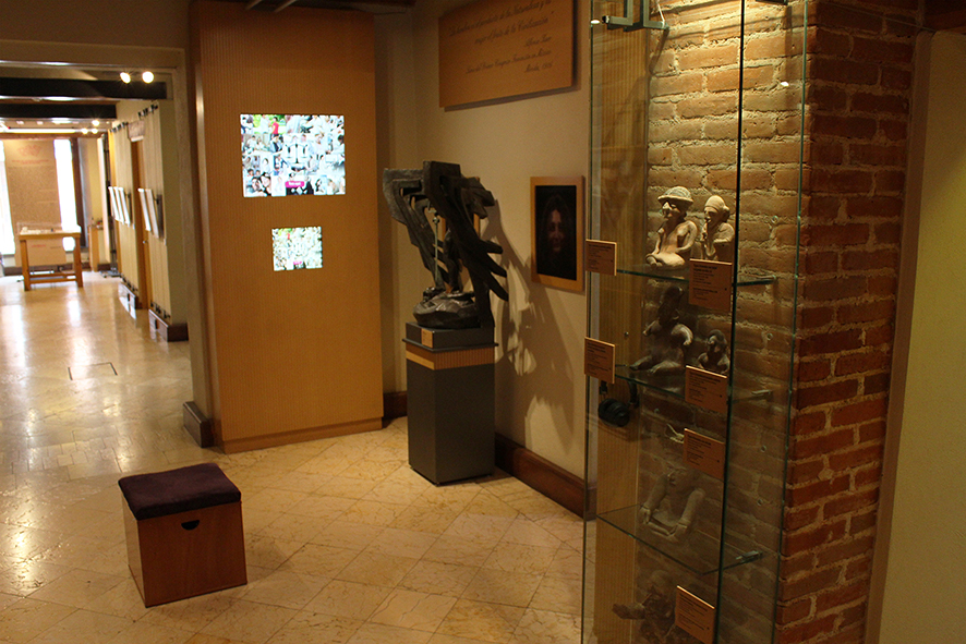 Sala 1 del museo de la mujer